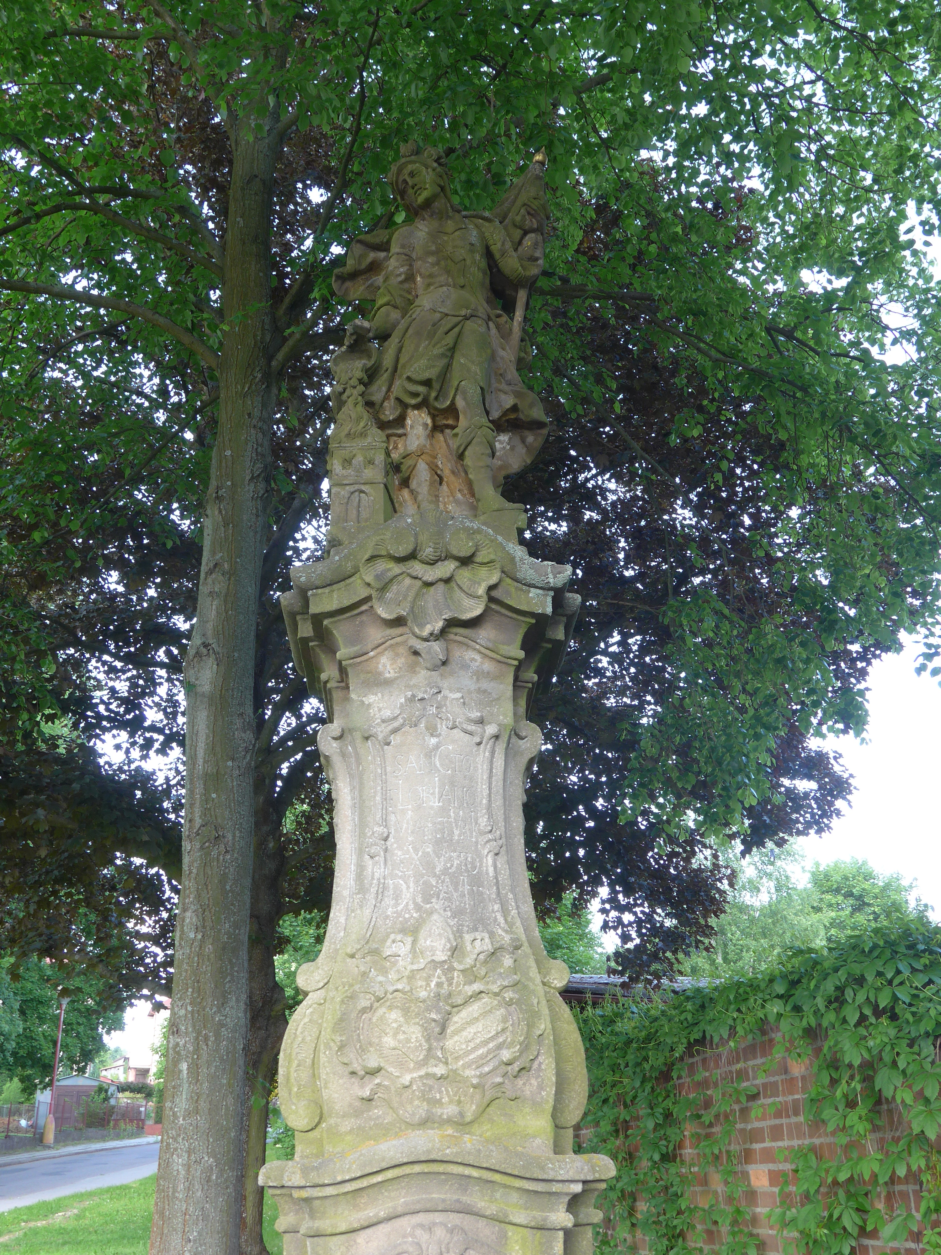 Socha sv. Floriána, ul. K Sídlišti